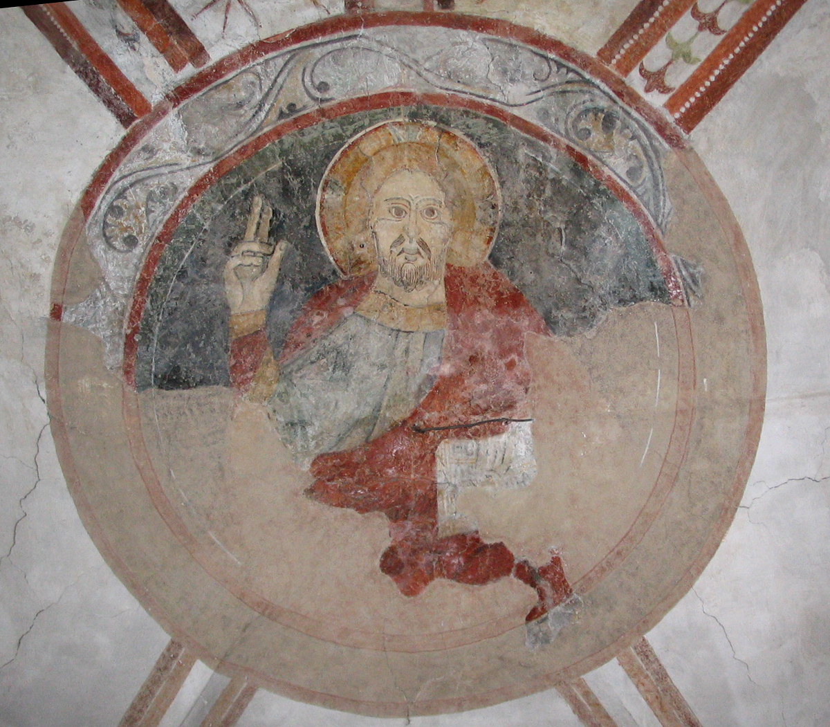 Autore Giorces. Almenno San Salvatore, la Pieve, particolare.